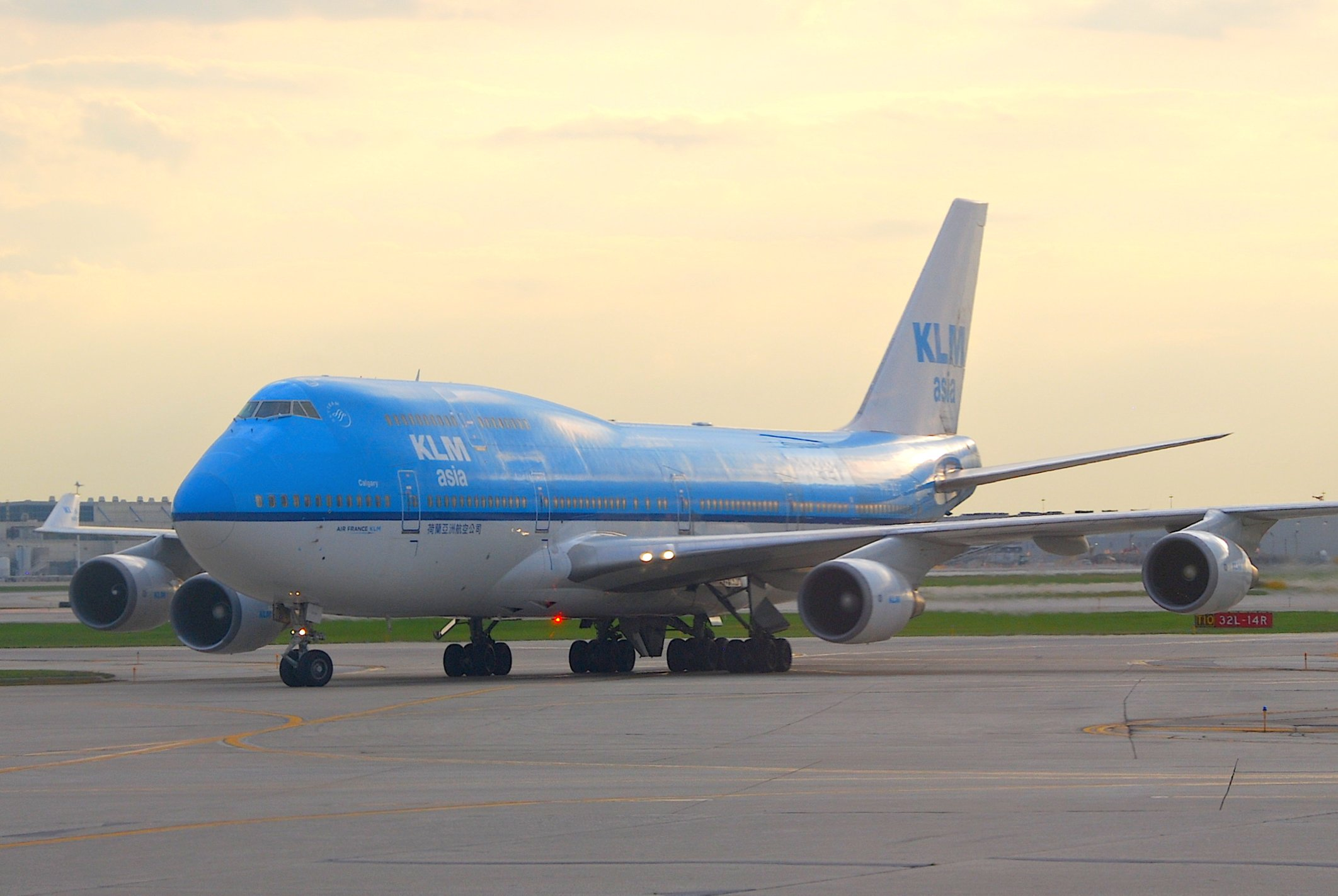 KLM Boeing 747-400 (M); PH-BFC@ORD;12.10.2011/624bw